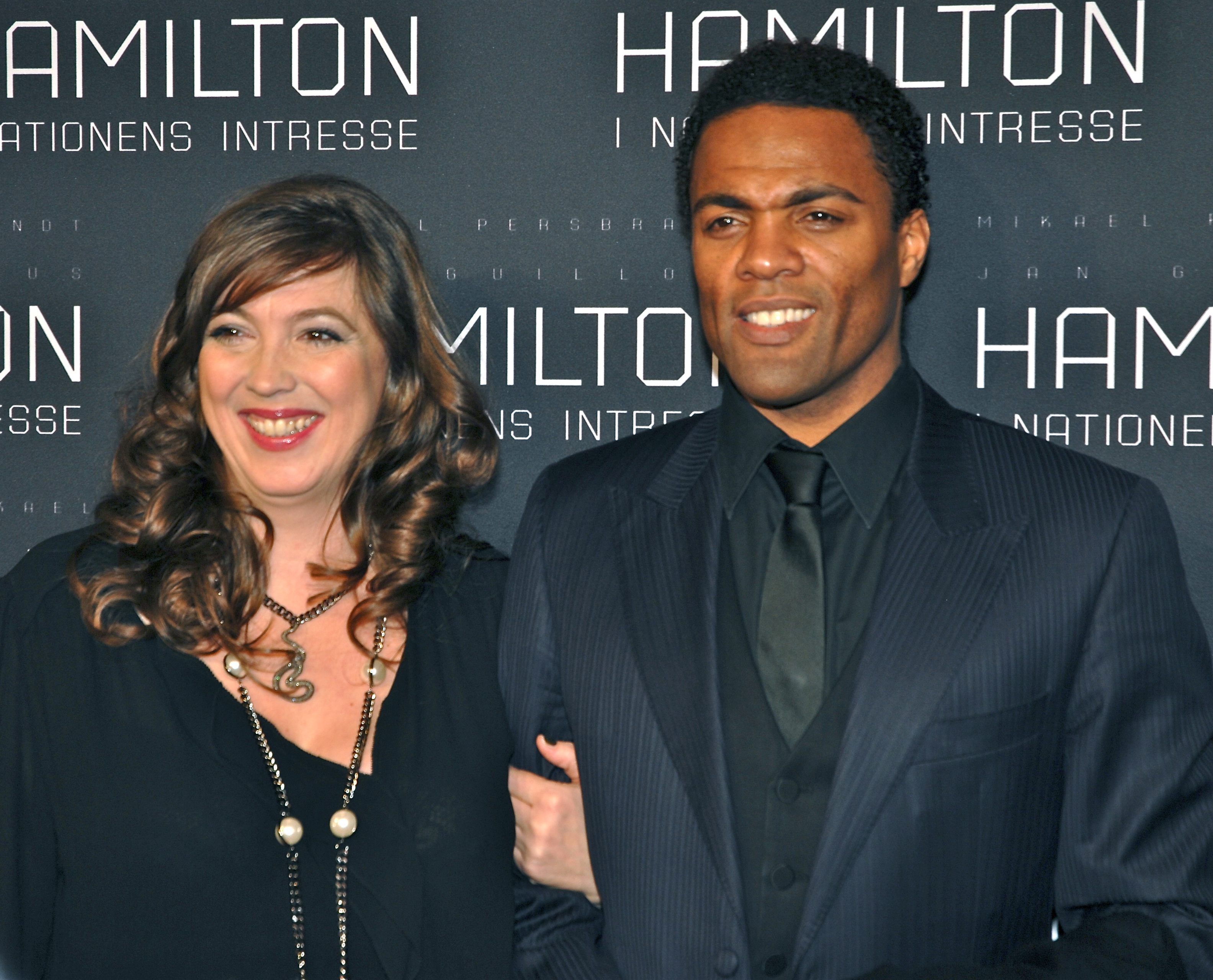 Kathrine Windfeld och Ray Fearon på galapremiären av Hamilton - I nationens intresse, på biograf Sergel i Stockholm den 9 januari 2012.